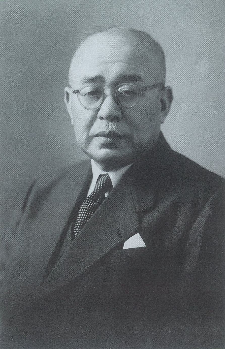 この写真は大麻唯男(1889-1957)の写真です。